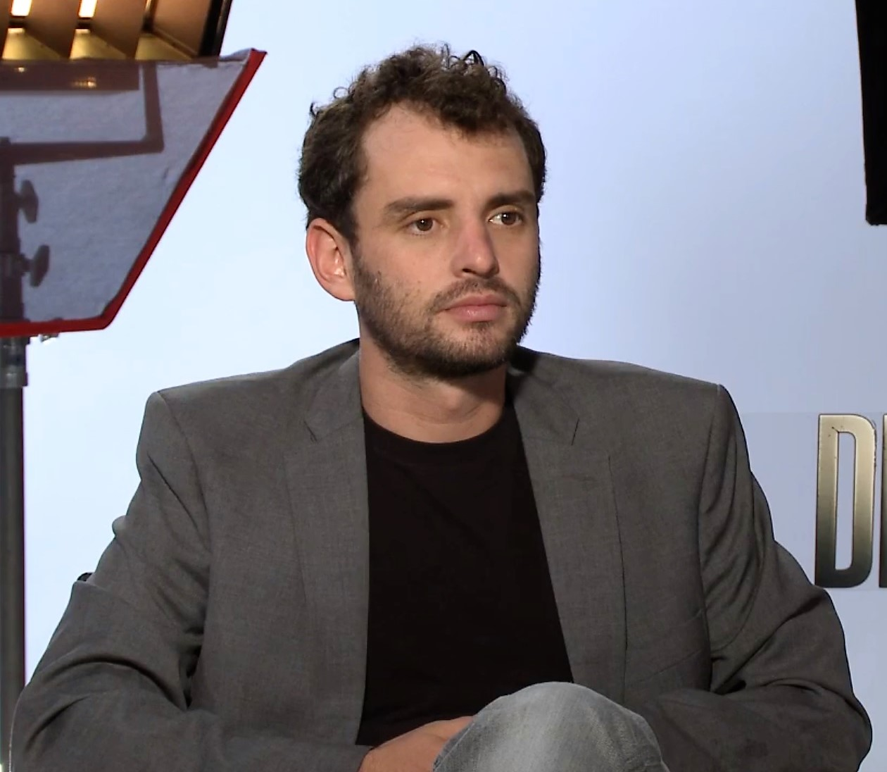 Jonas Cuaron habla del odio generado por Donald Trump